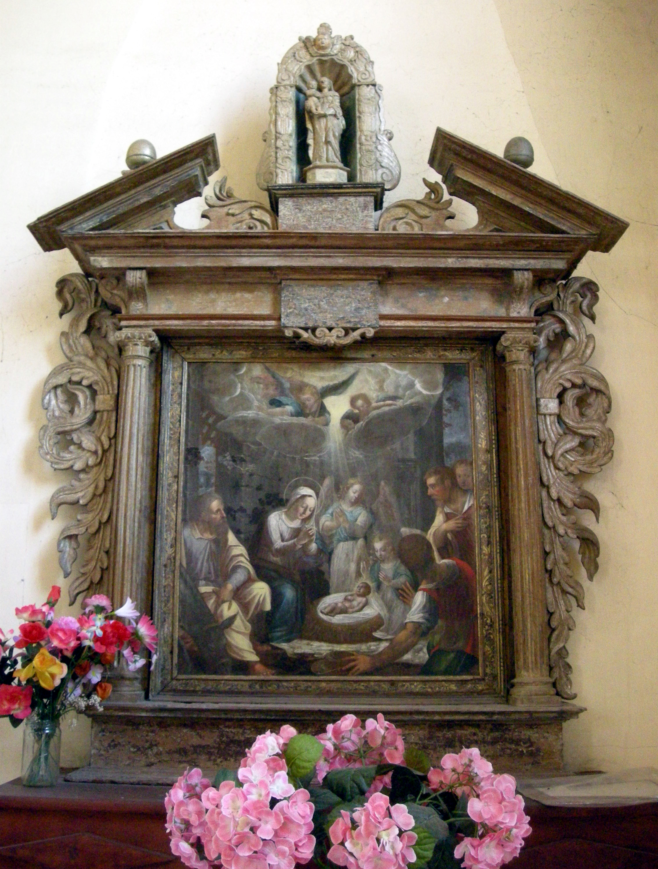 L'Adoration des bergers (Claude Bassot, 1620) dans l'église de Coinches (département des Vosges)